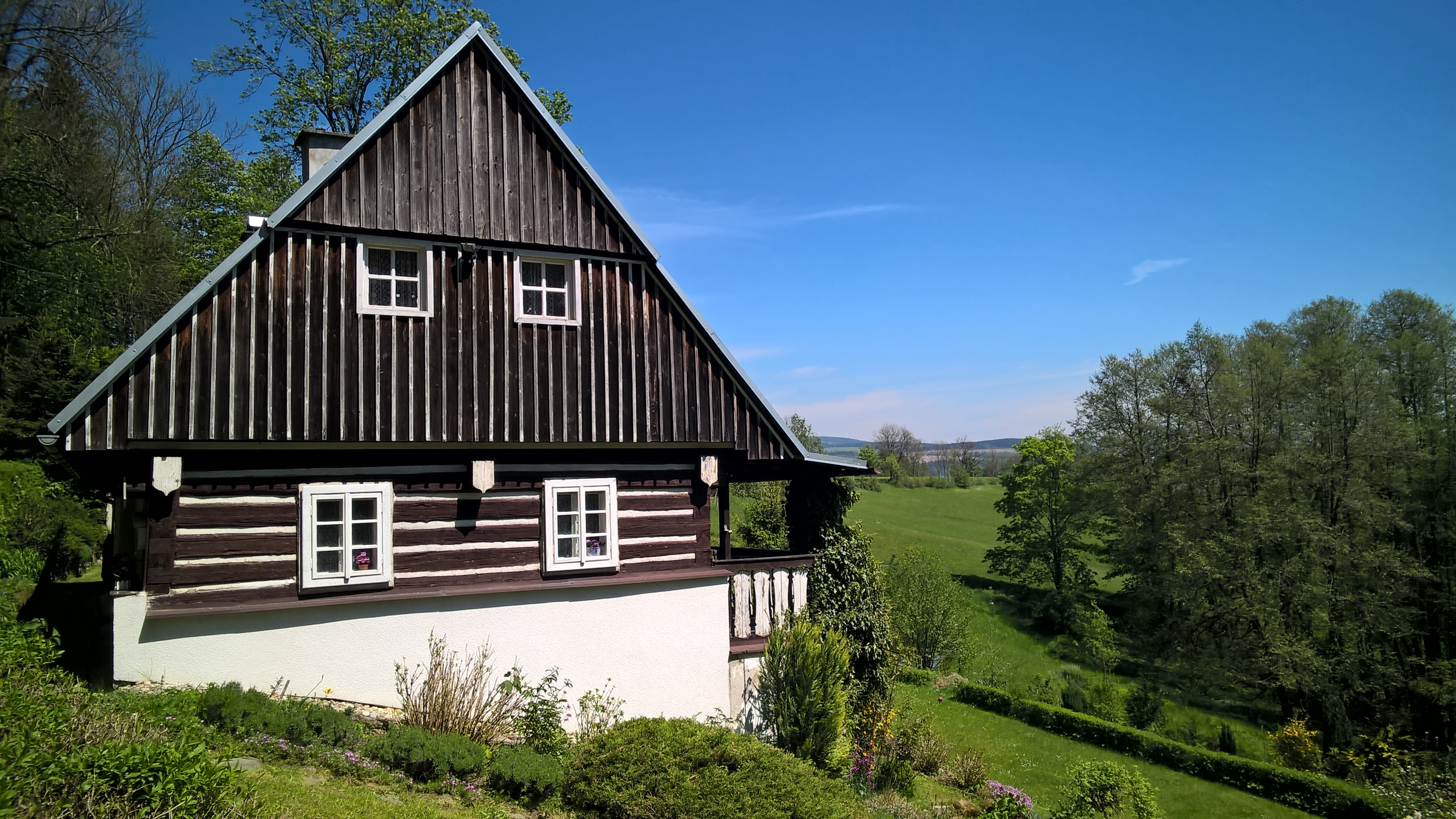 Rydvaltice (osada Pelíkovic) - lidová architektura če. 10